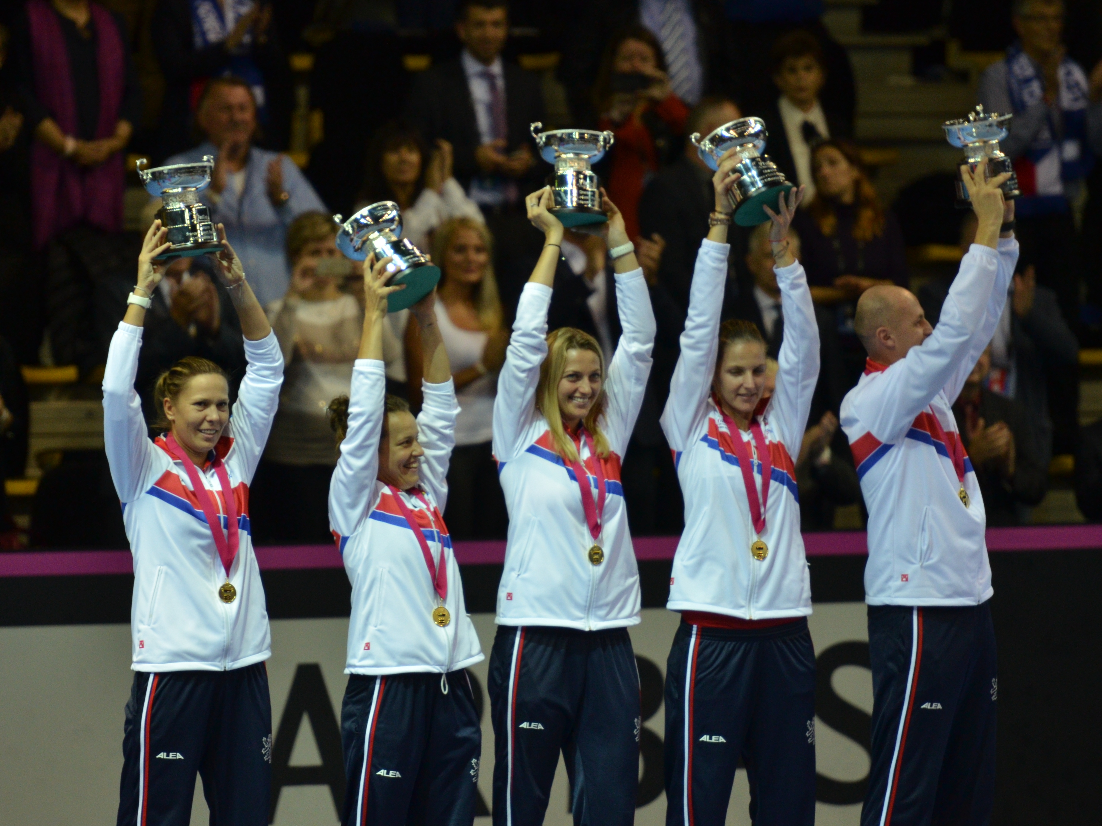 PPP_3485